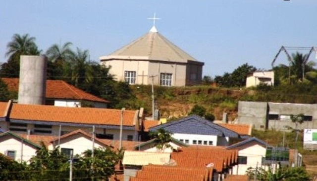 Igreja São francsco